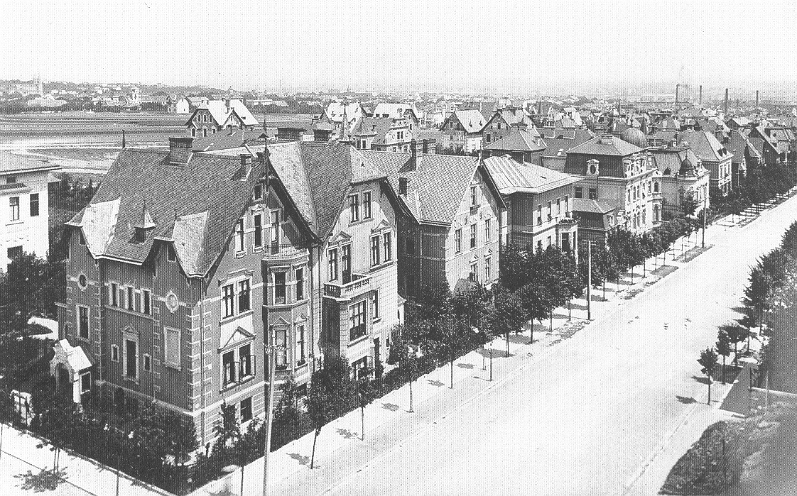 Cottage (Wien), Hasenauerstraße seen from Gregor-Mendel-Straße in 1900.